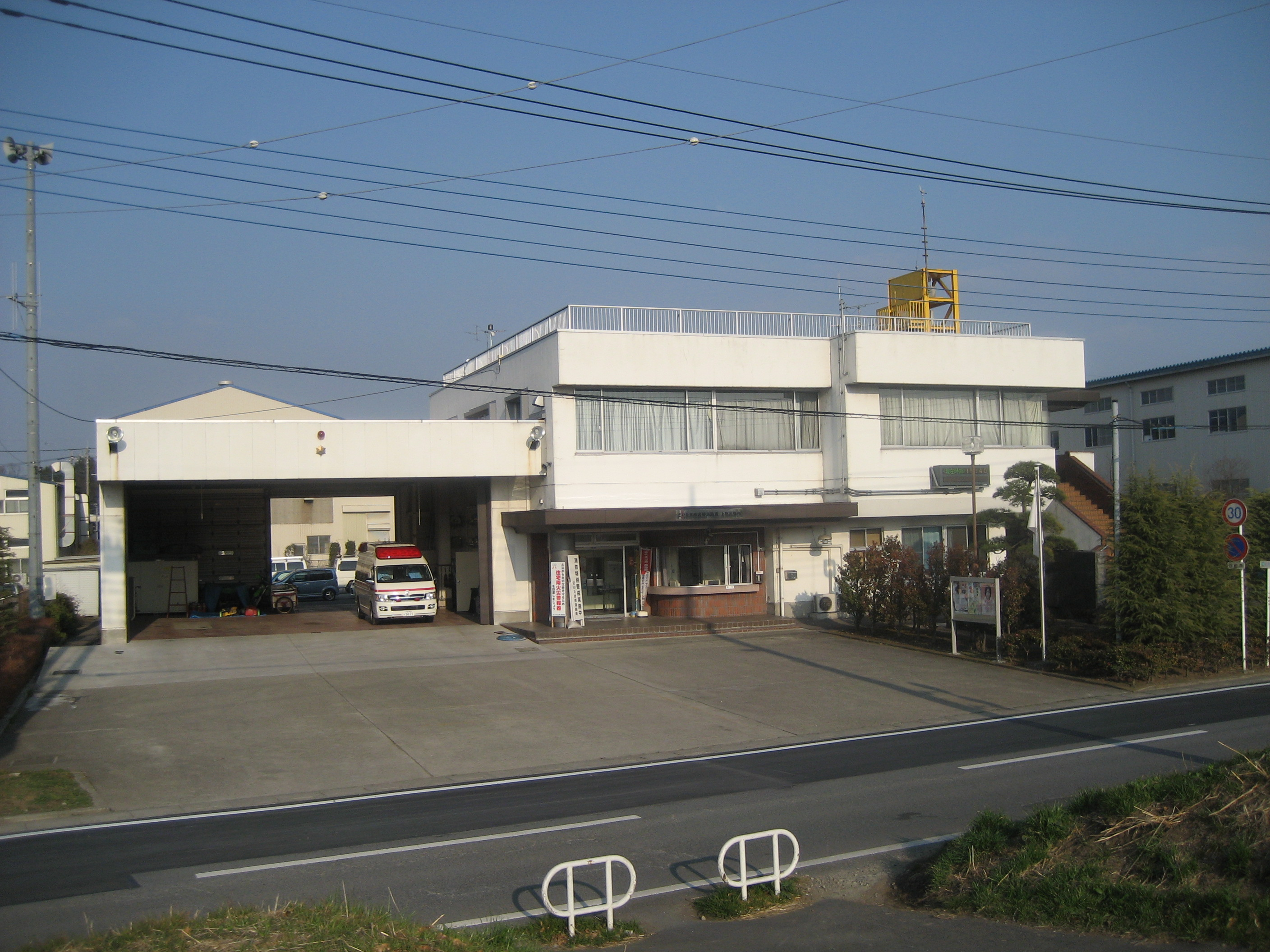 さいたま市消防局岩槻消防署上野出張所庁舎